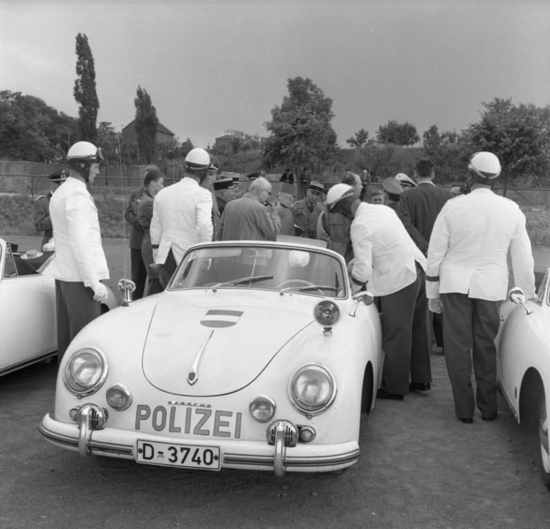 Vorführung der Autobahnpolizei d. Landes Nordrhein-Westfalen für französische Polizeioffiziere Hersel bei Bonn